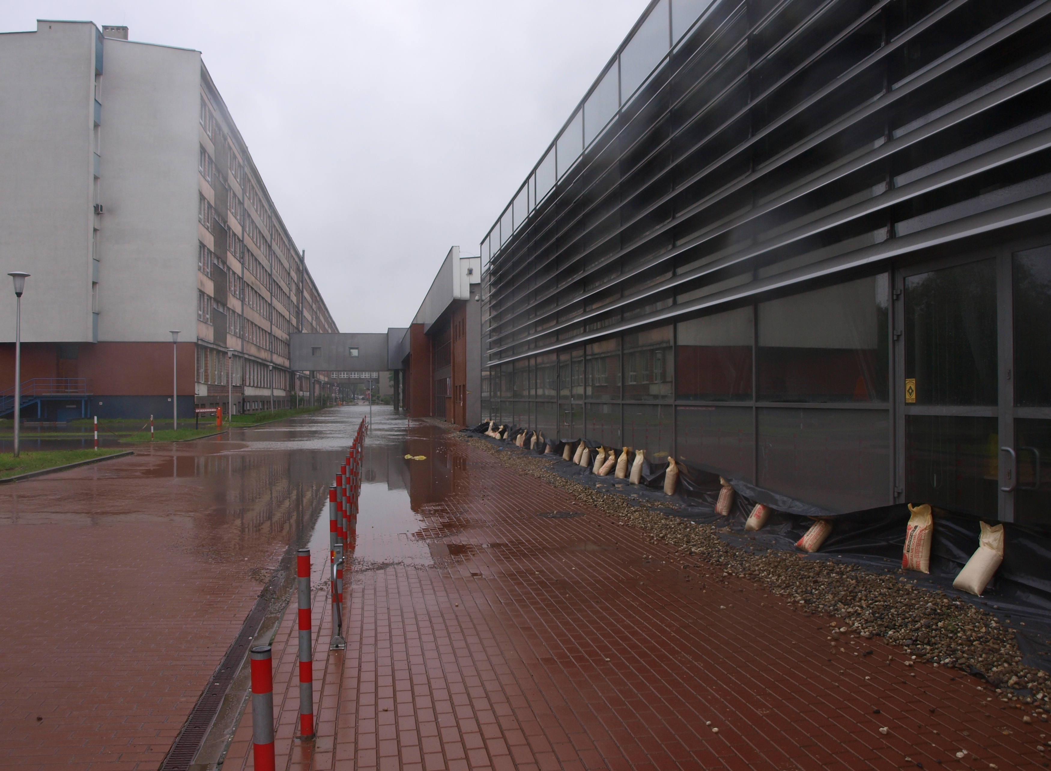 Po lewej Wydział Mechaniczny Technologiczny Politechniki Śląskiej (Konarskiego 18-18a), po lewej Technopark Gliwice (Konarskiego 18b), a środkiem płynie woda z wezbranej Kłodnicy.